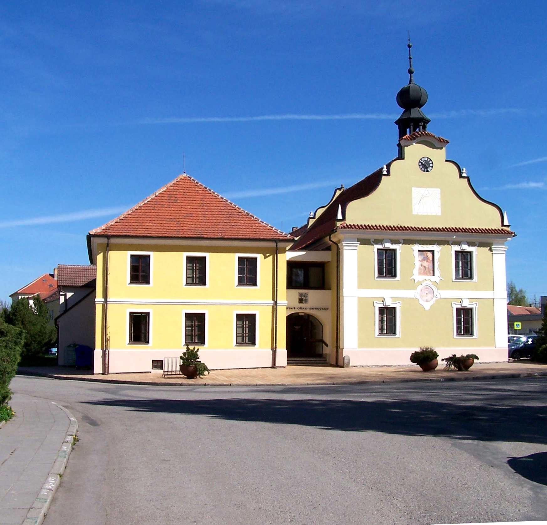 Radnice (z poloviny 17. století) s infocentrem na náměstí v Borovanech, okres České Budějovice